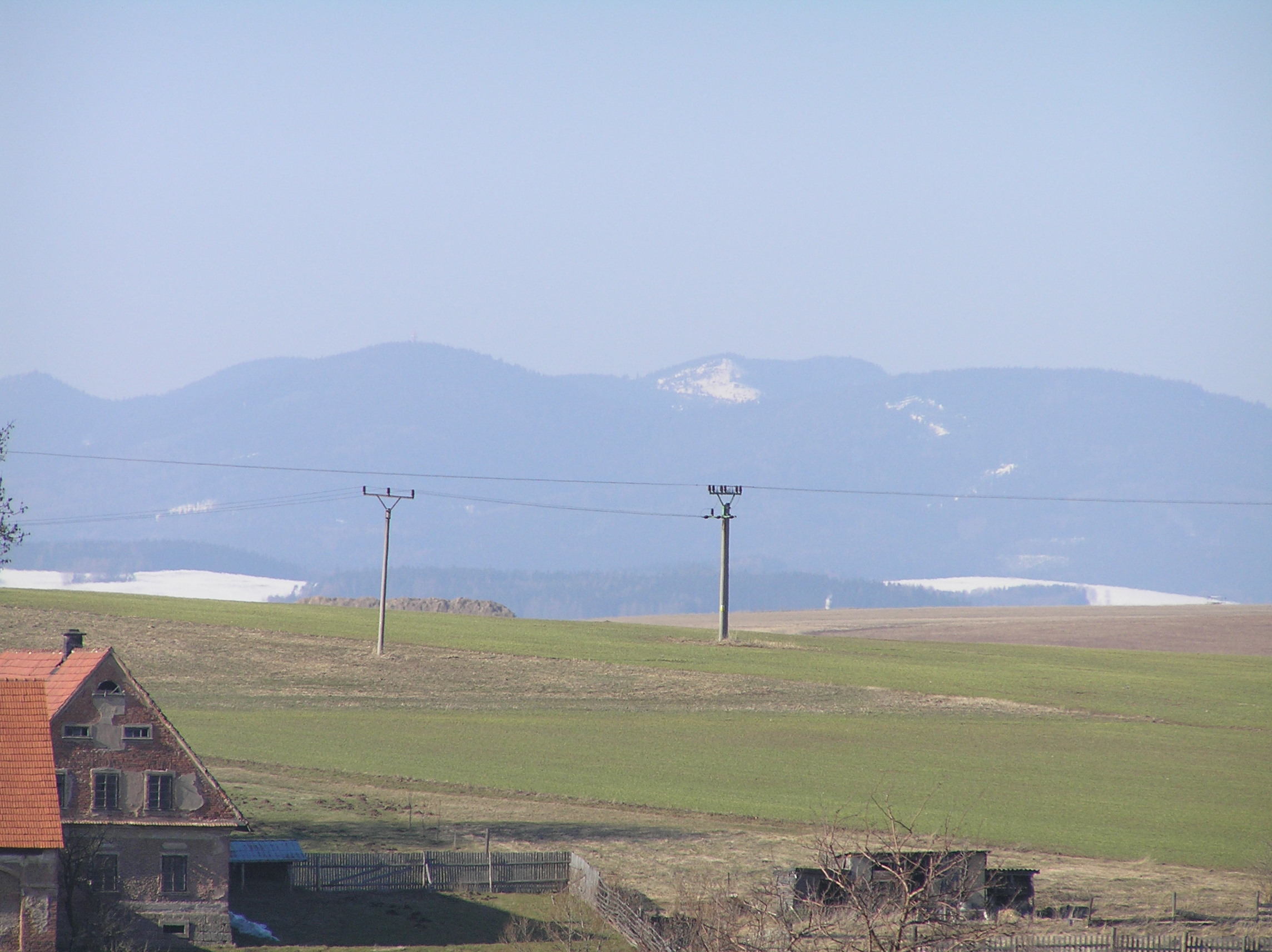 The Javoří hory Mountains